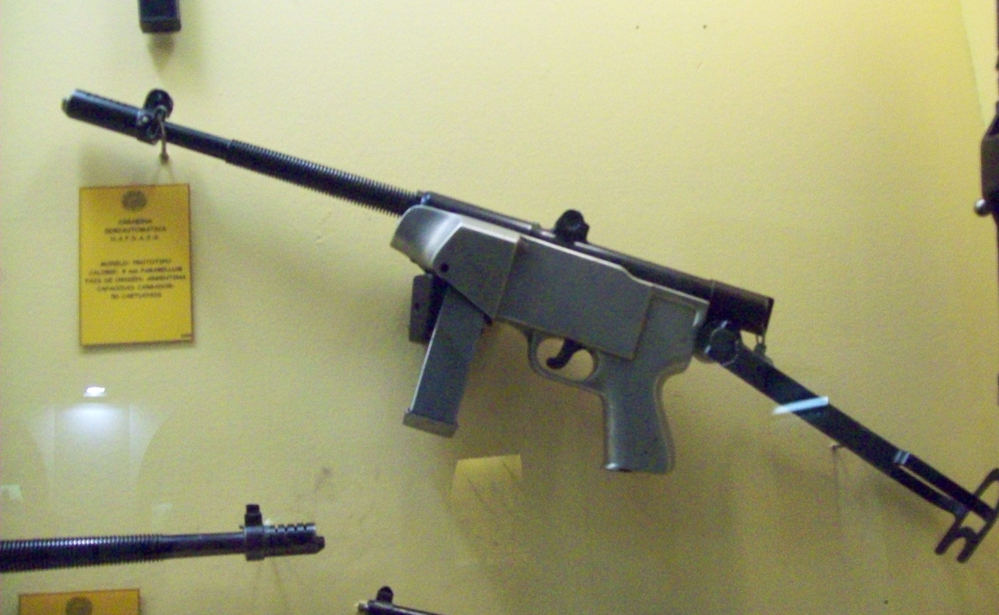 Armamento expuesto en el Museo de Armas de la Nación, ciudad de Buenos Aires, Argentina 2014.